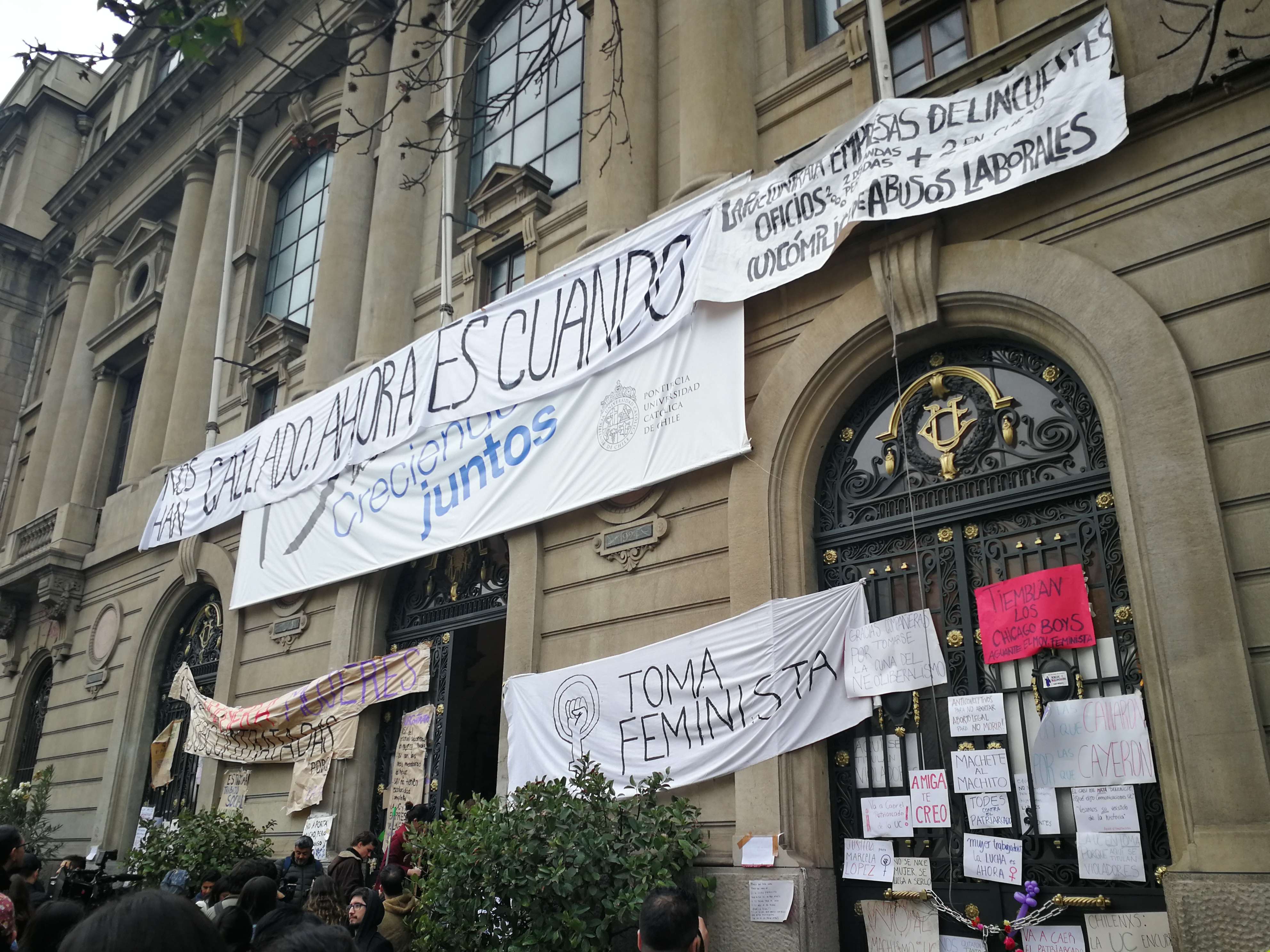 Imagen de la toma feminista en la casa central de la Pontificia Universidad Católica de Chile (PUC) en 2018.